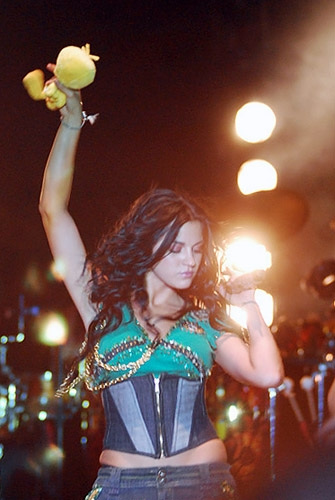 Imagen de la perfecta Maite Perroni Beorlegui